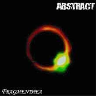 Predná strana obalu v poradí tretieho posledného demo albumu kapely Abstract z roku 2000 s názvom Fragmenthea.